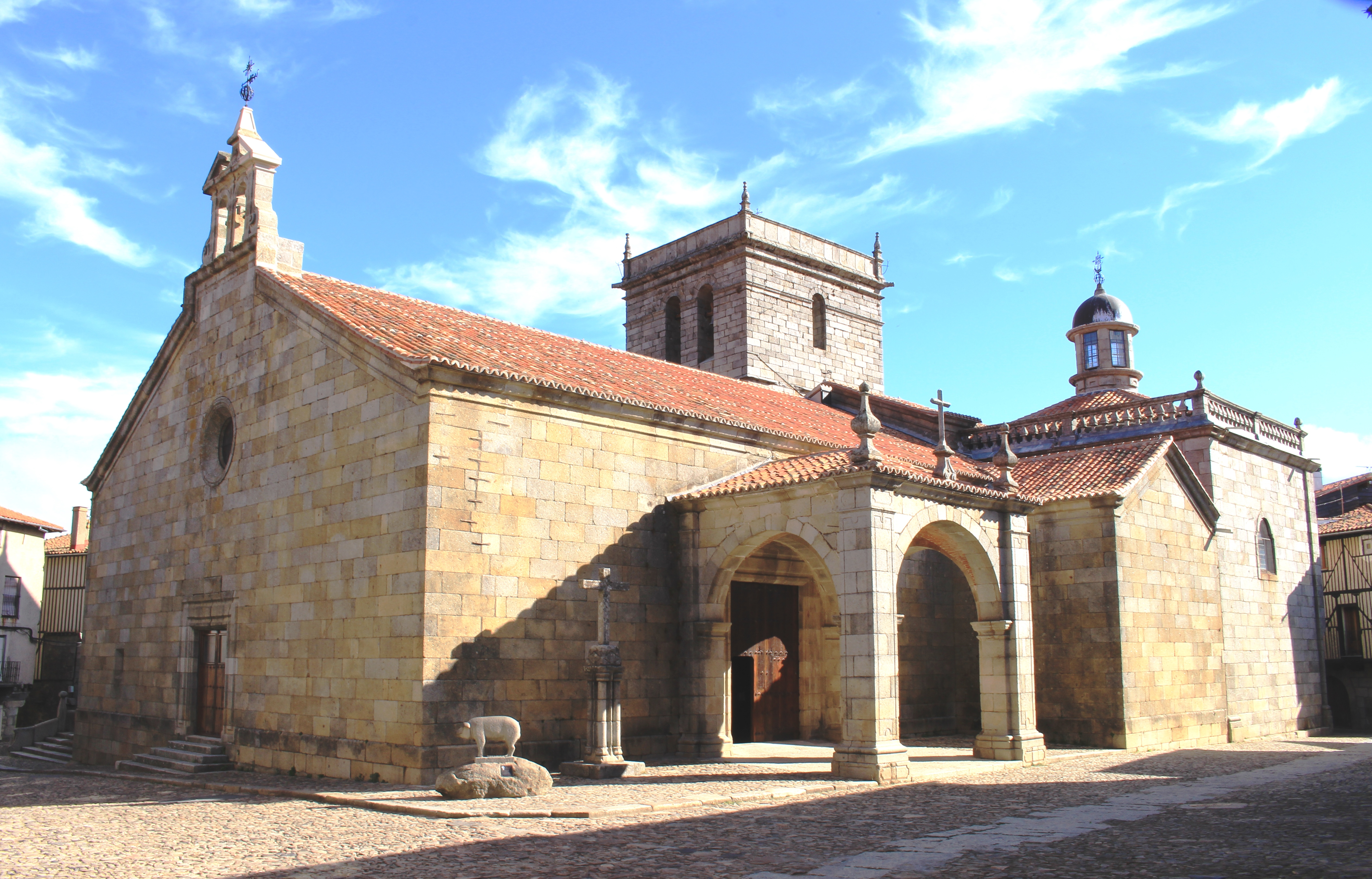 Eglise de la Commune de La Alberca (Salamanque)